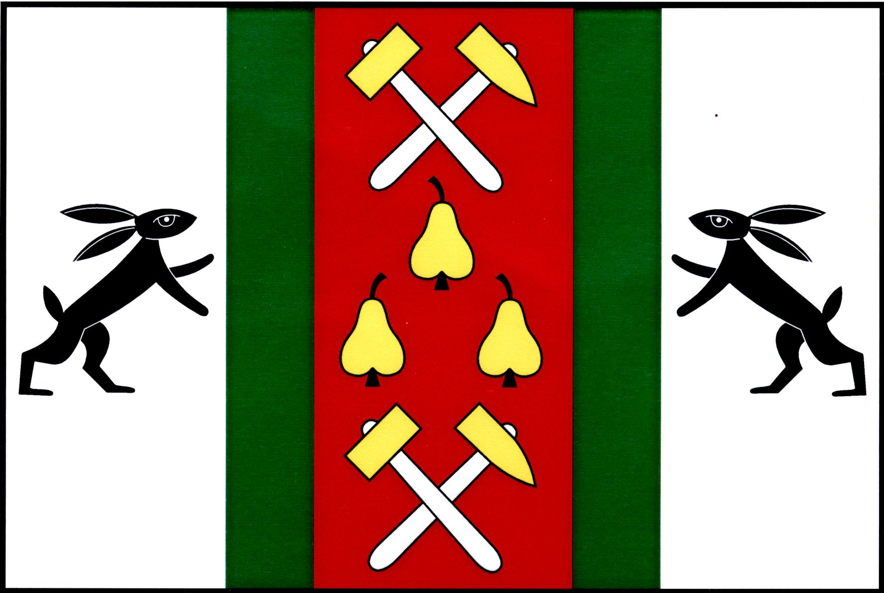 Vlajka obce Hředle